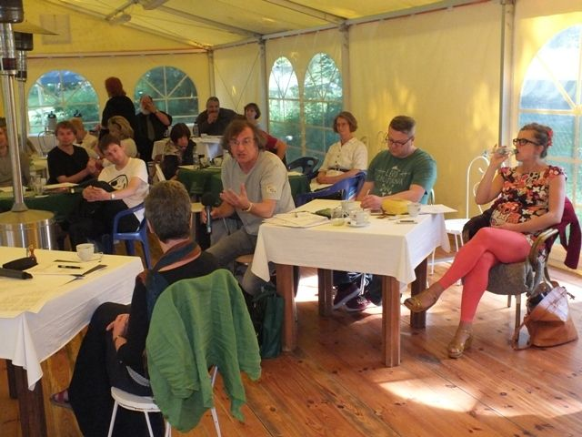 Diskusní setkání SRT